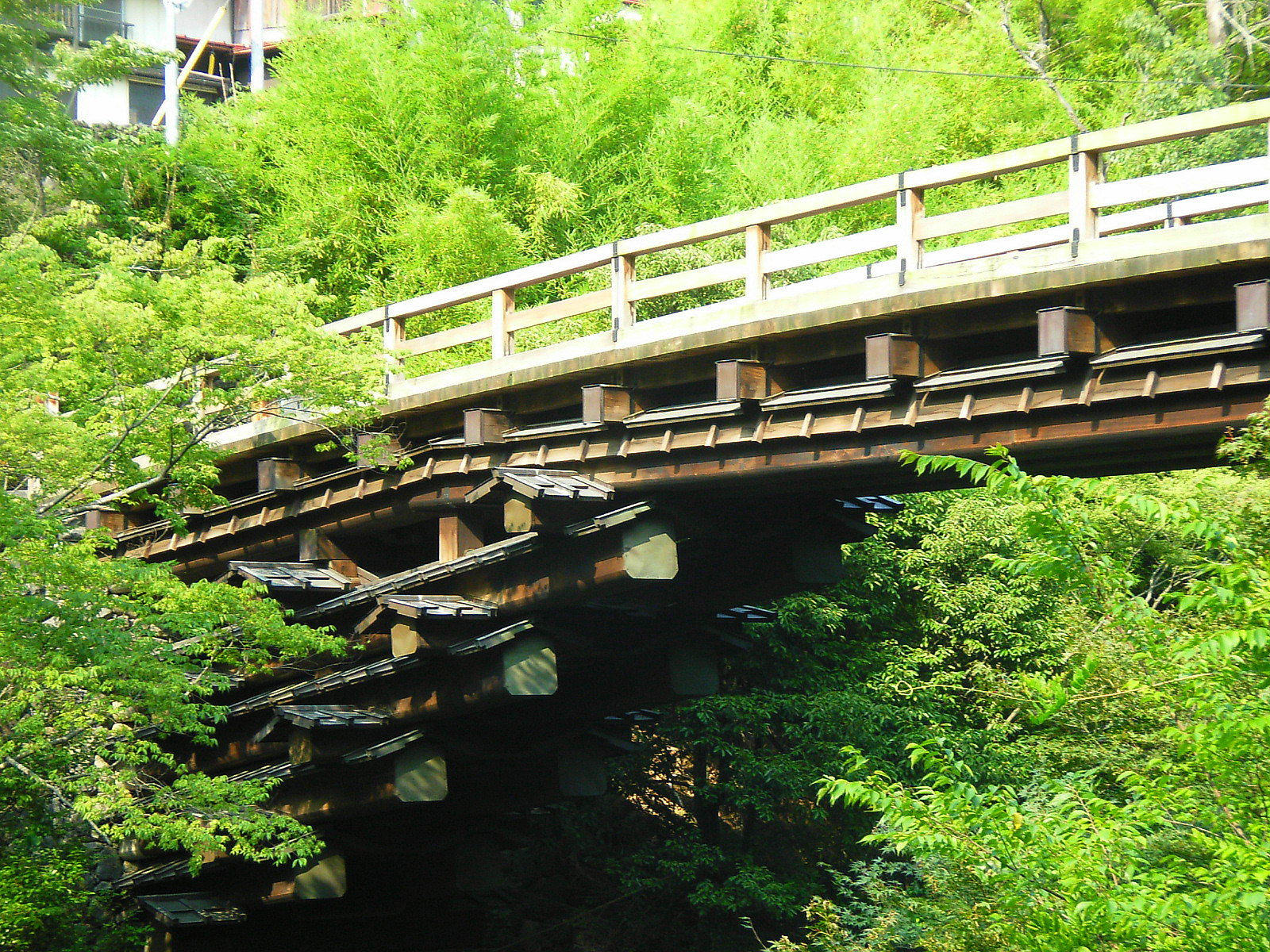 Saru Bridge. Ōtsuki, Yamanashi Prefecture, Japan.